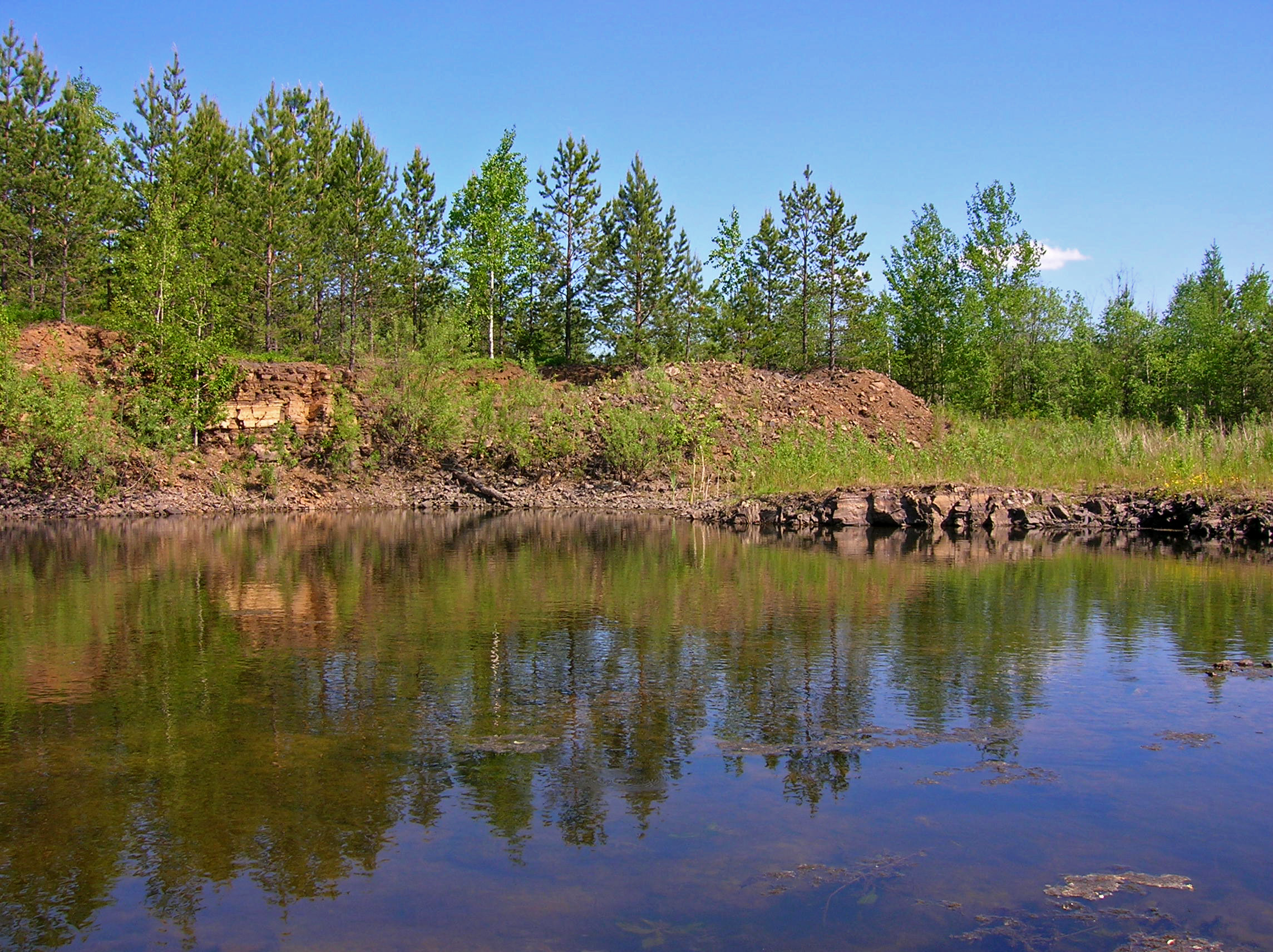 g. Nizhnyaya Tura, Sverdlovskaya oblast', Russia